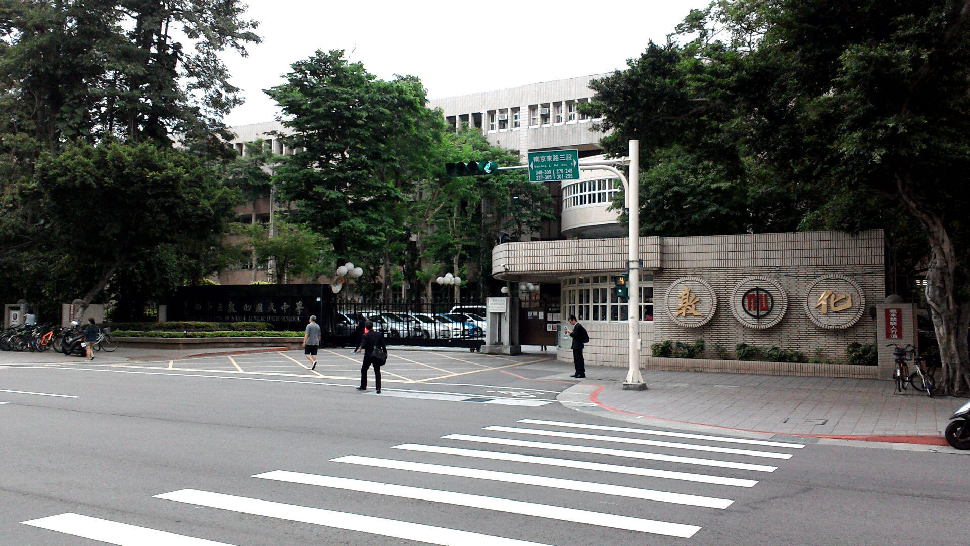 台北市立敦化國民中學,台北市松山區中崙次分區中正里